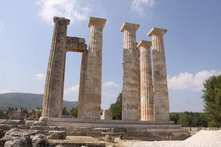 Templo de Hércules en Nemea, visitado por Francisco de Miranda en 1786